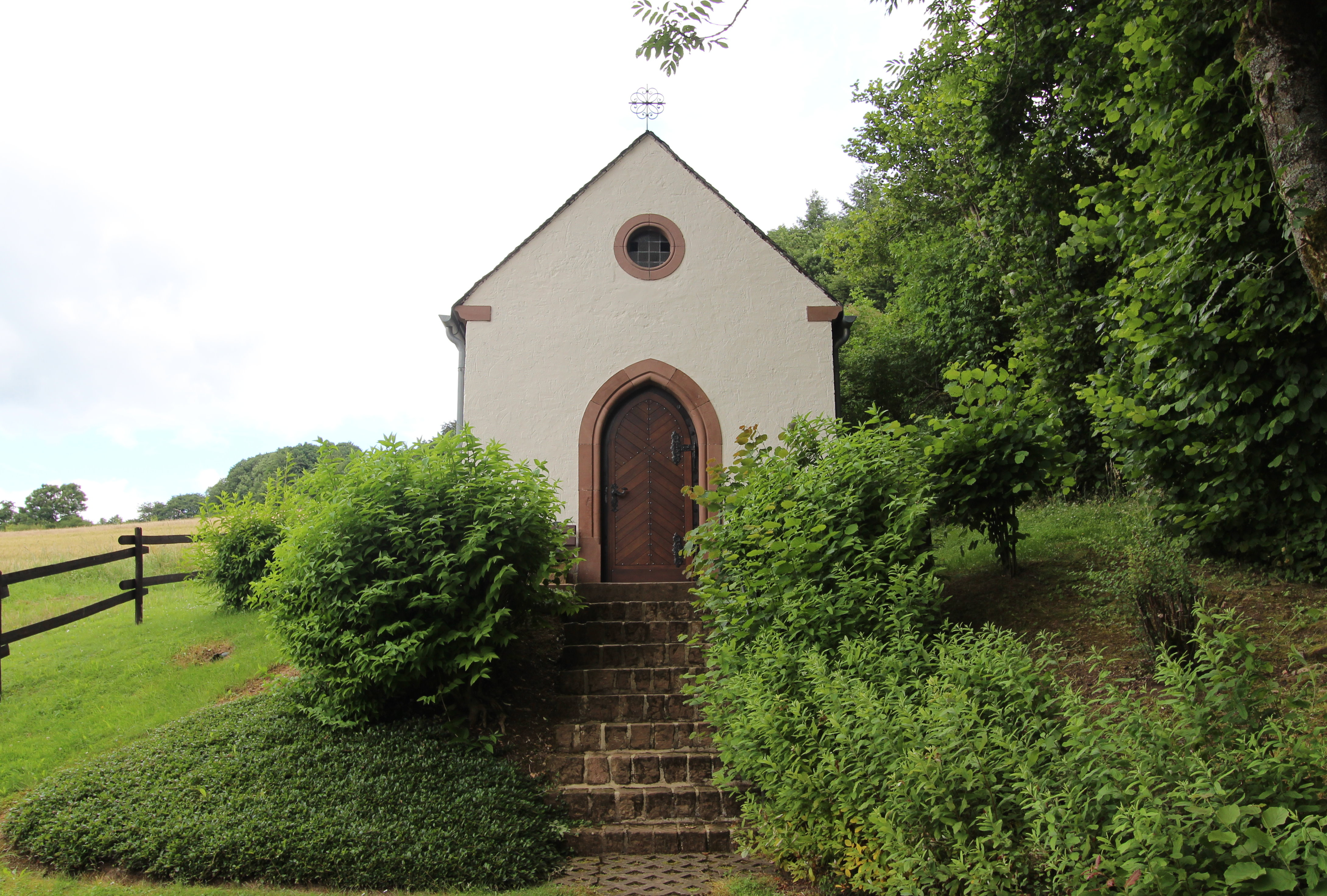 54655 Malbergweich in der Eifel. Neuerrichtung der Marienkapelle vor der Hardt von 1950. Einsegnung der Kapelle am 03.06.1951. Aufnahme aus Süd-Westen von 2016.